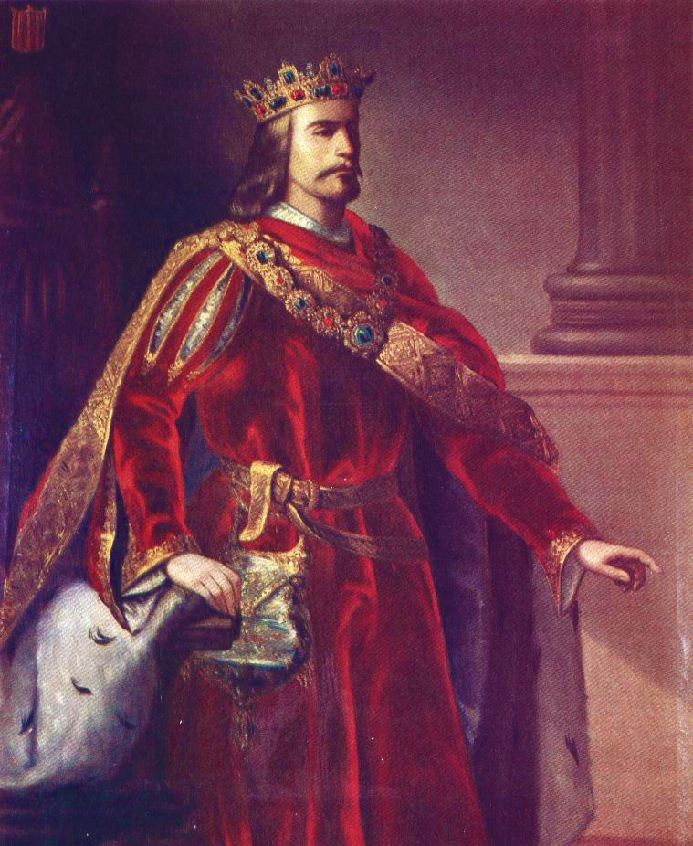 Retrato imaginario del rey Alfonso IV de Aragón (1299-1336), que fue hijo del rey Jaime II de Aragón y de la reina Blanca de Anjou.